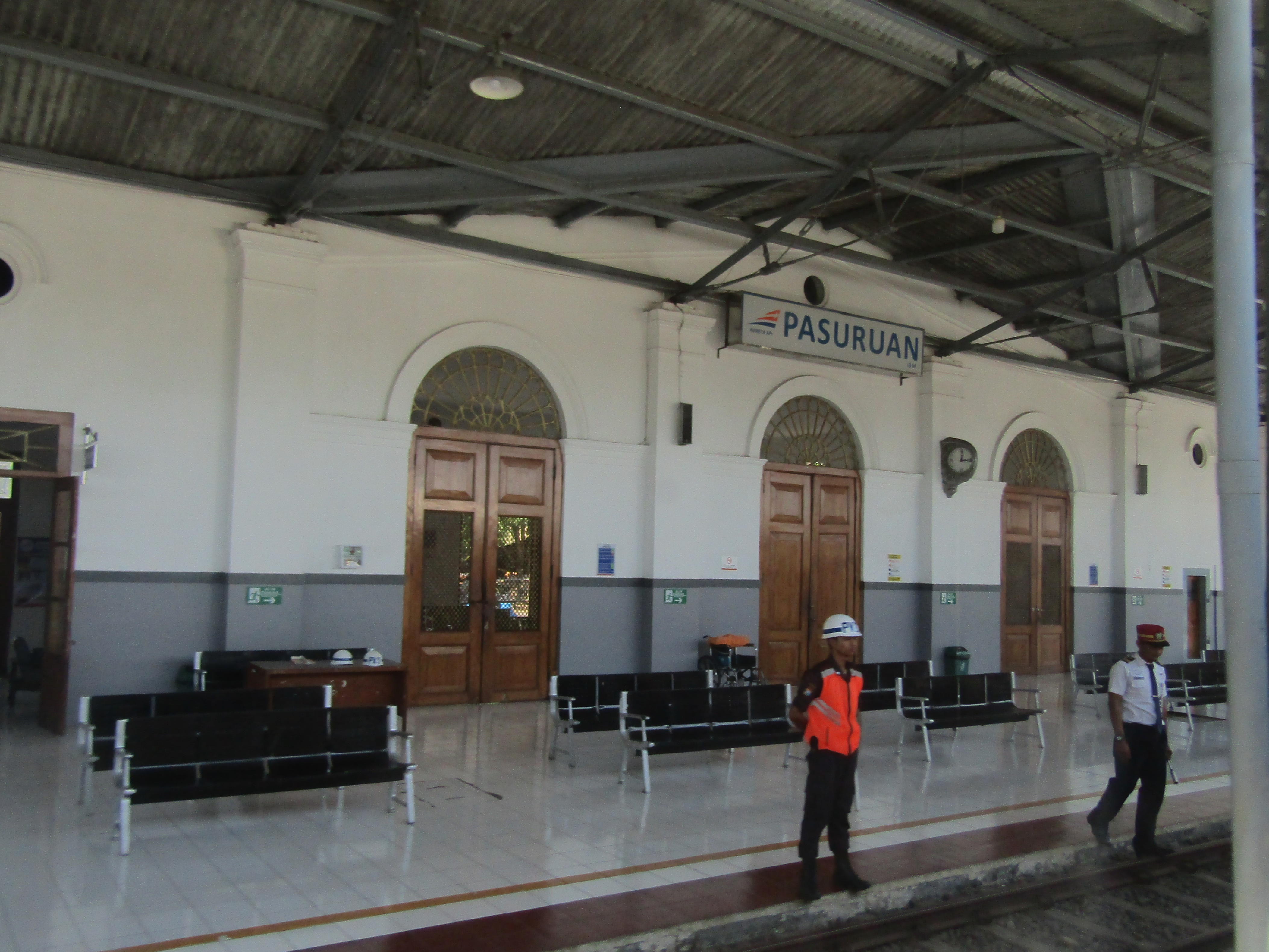 Bagian dalam Stasiun Pasuruan, 2019